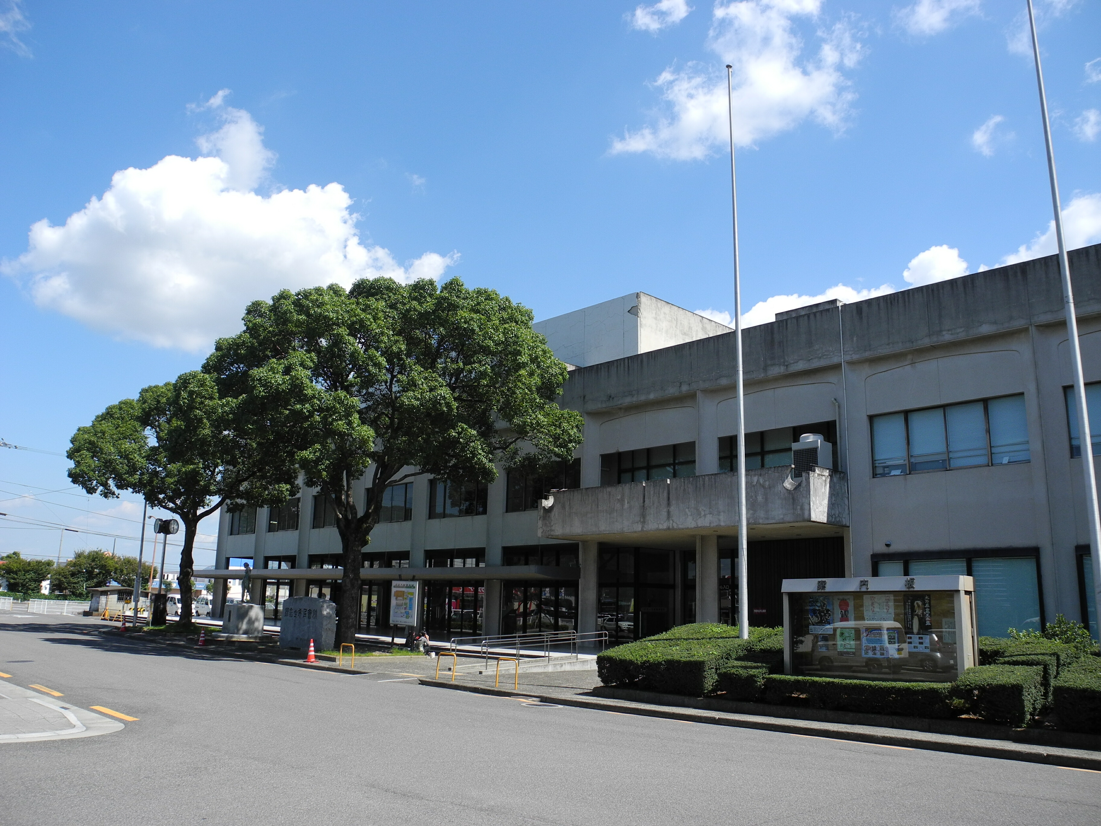 観音寺市民会館(大ホール入口) - 香川県ja:観音寺市